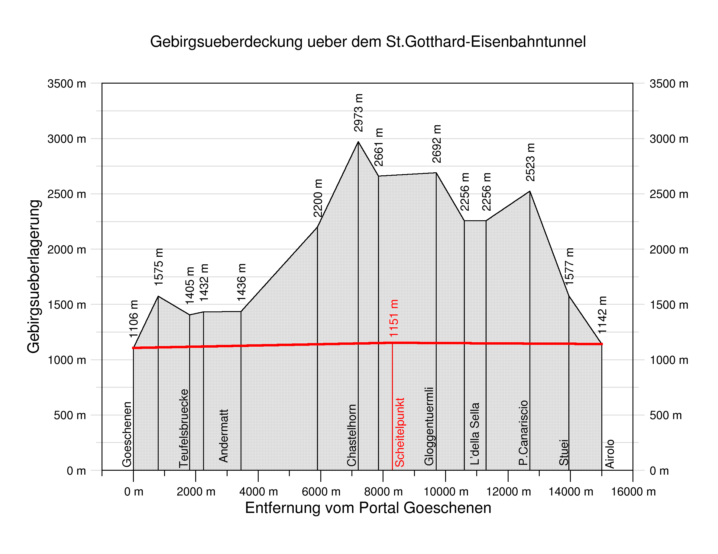 Gebirgsüberlagerung über dem St.Gotthard-Eisenbahntunnel in der Schweiz